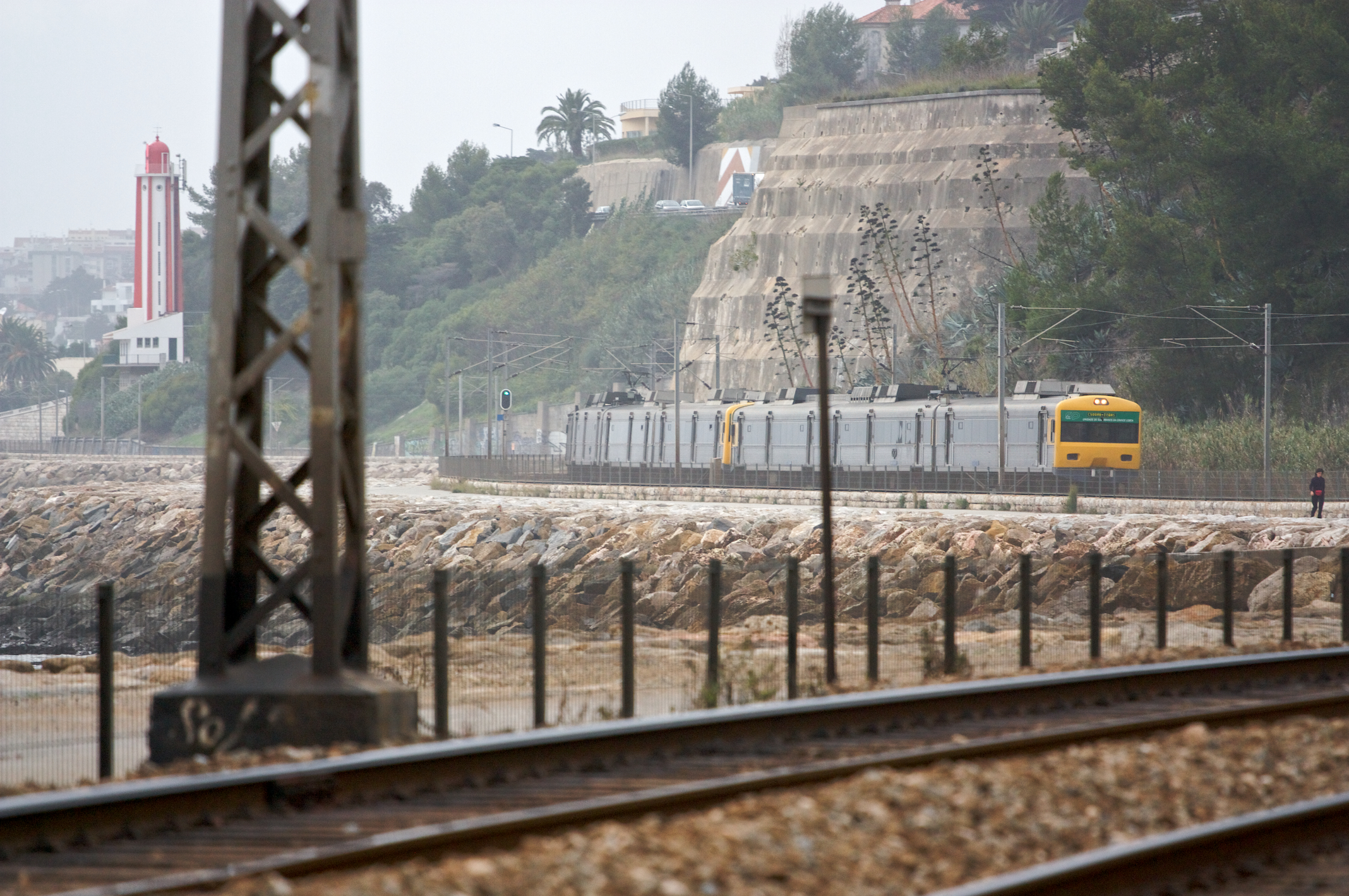 Tipo: Comboio Urbano 19720 [Oeiras - Cais do Sodré] Local: Cruz Quebrada [Linha de Cascais, PK 10] Data e hora: 13 de Novembro de 2009 [16h58] Material: Automotoras 326x e 325x [Unidade Tripla Eléctrica + Unidade Quádrupla Eléctrica] 2º plano: Farol da Gibalta